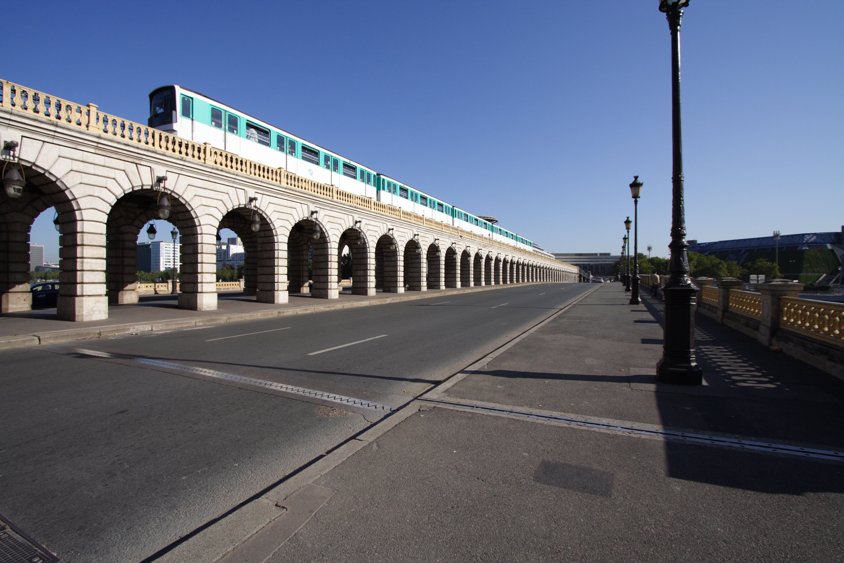 Pont de Bercy(Paris, France)